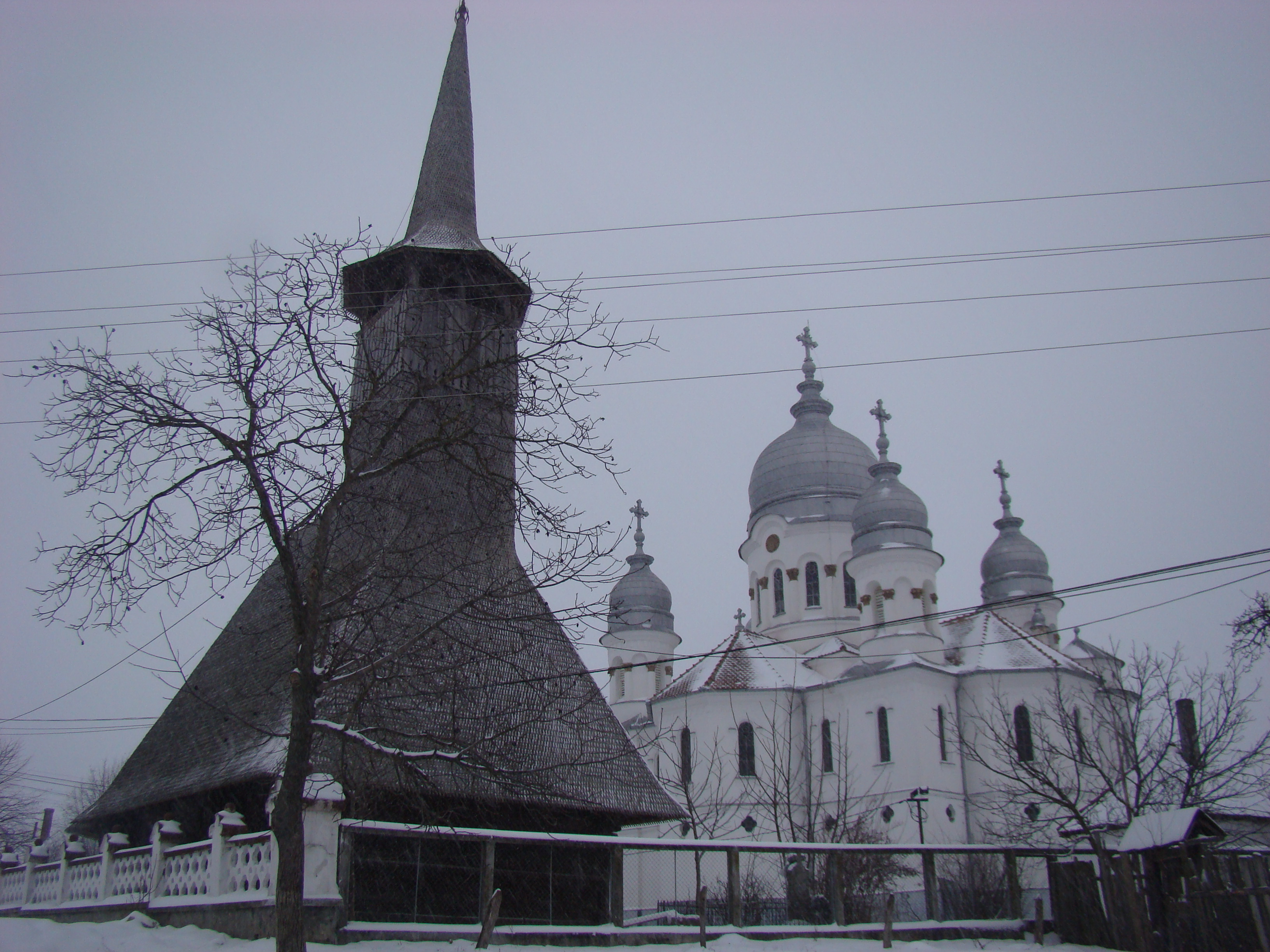 Tilecuș, Bihor